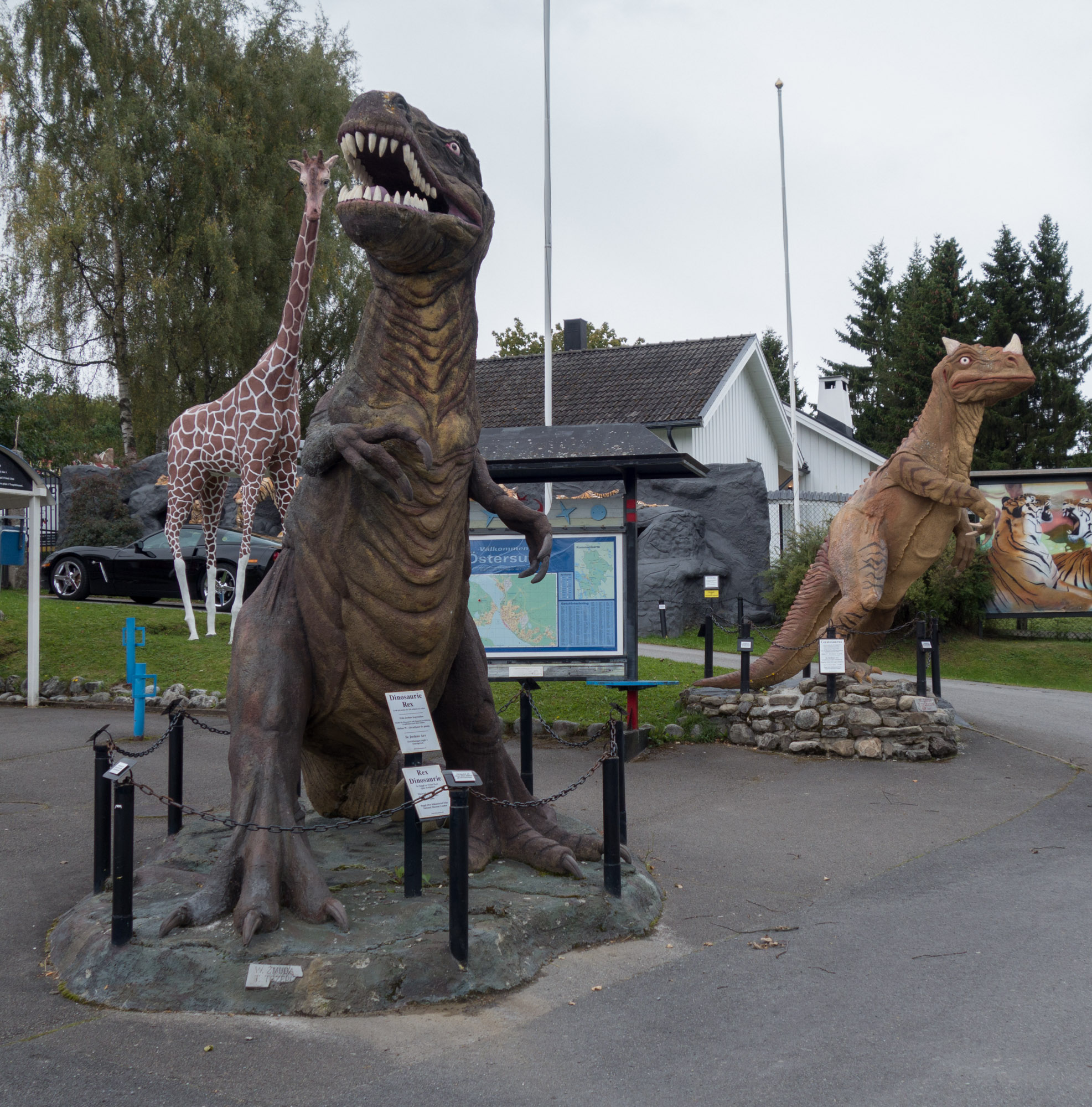 En Dinosaurie utanför Frösö Zoo